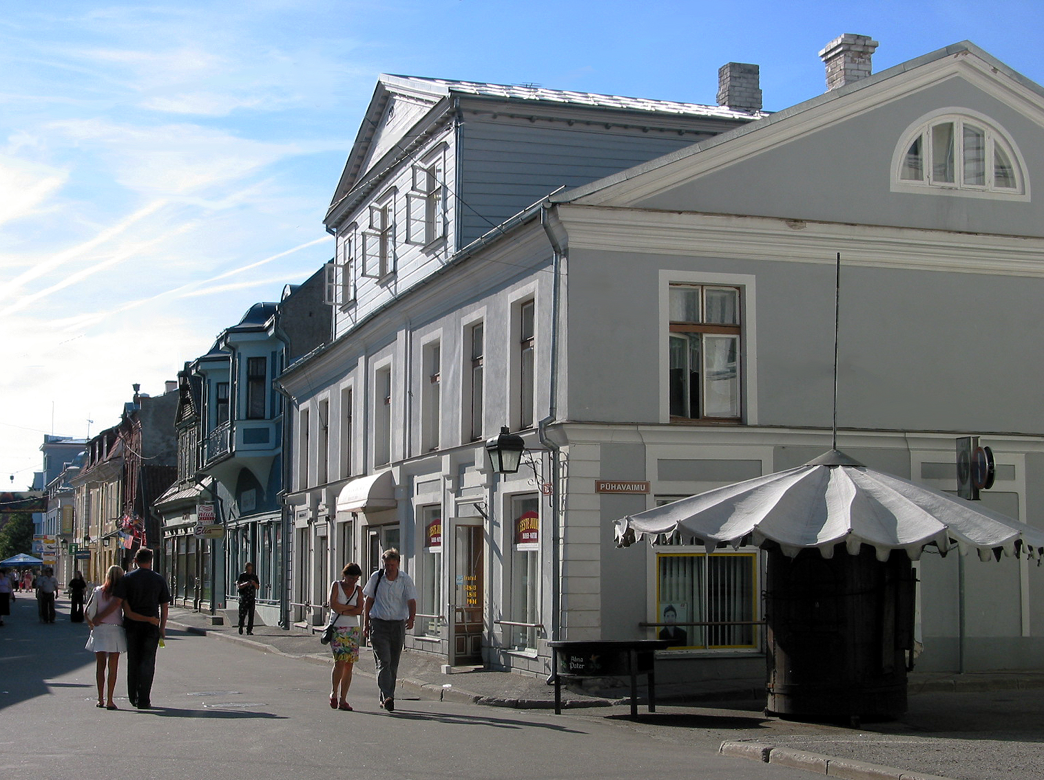 Pärnu main street, Estonia